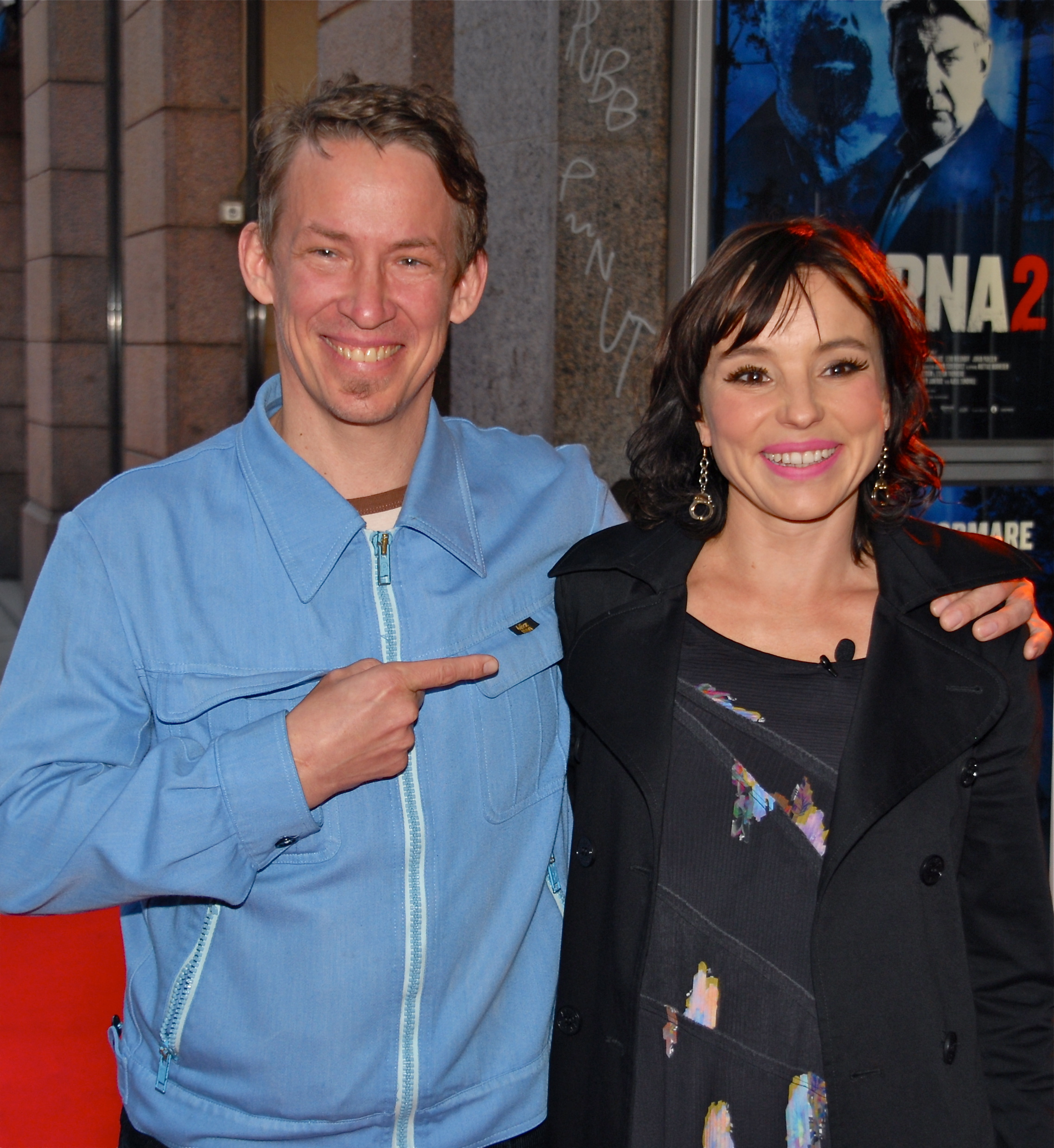 Figge Norling & Lo Kauppi på premiären av filmen Jägarna 2 den 5 september 2011.